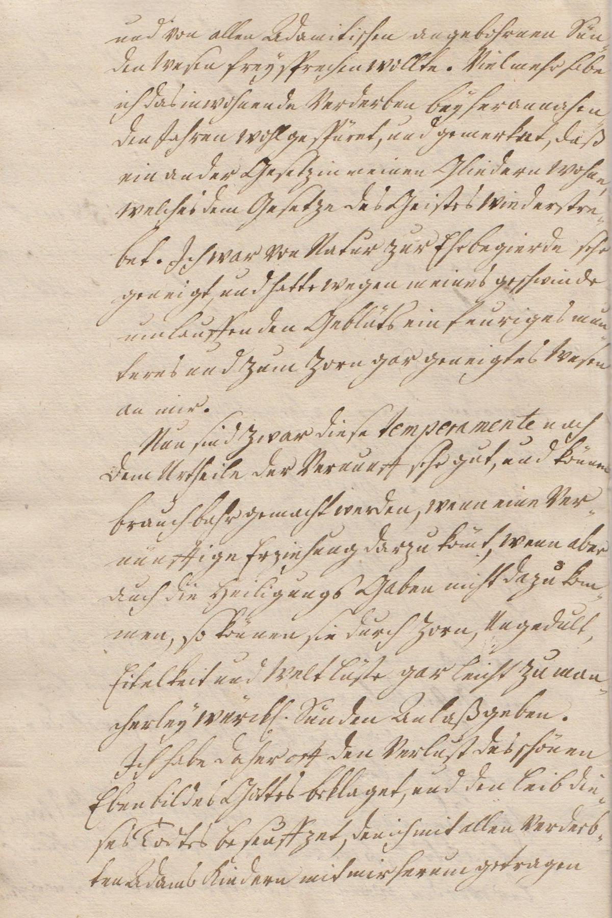 Seite 16 der Leichenpredigt für den Pastor August Wilhelm Reinhart (1696/1770), Bürger der Stadt Heringen an der Helme.